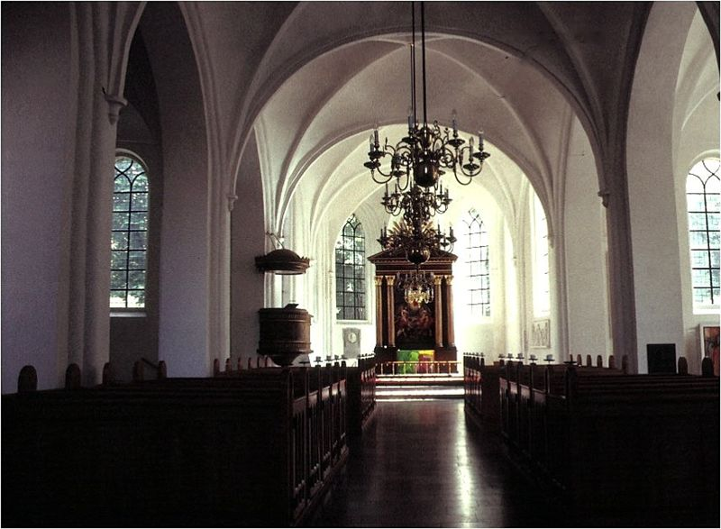 Sankt Petri Kirke i Danmark. Skibet set mod øst